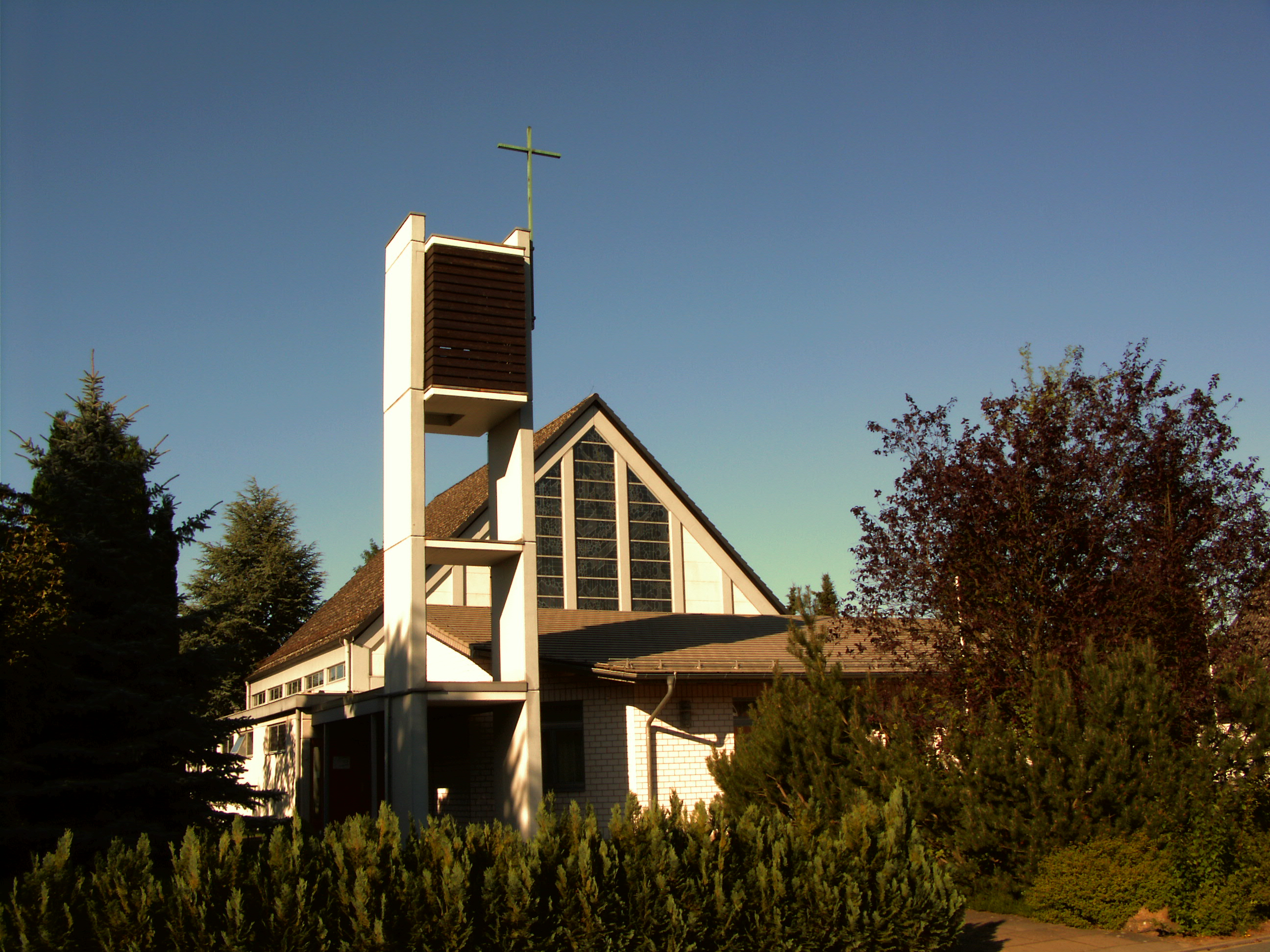 Katholische Kirche St. Marien in Wittingen, Landkreis Gifhorn